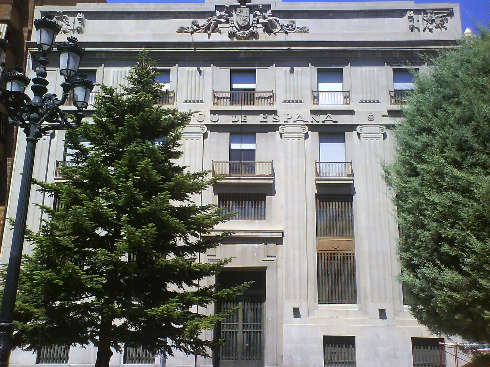 Antiguo edificio del Banco de España de la ciudad de Albacete.